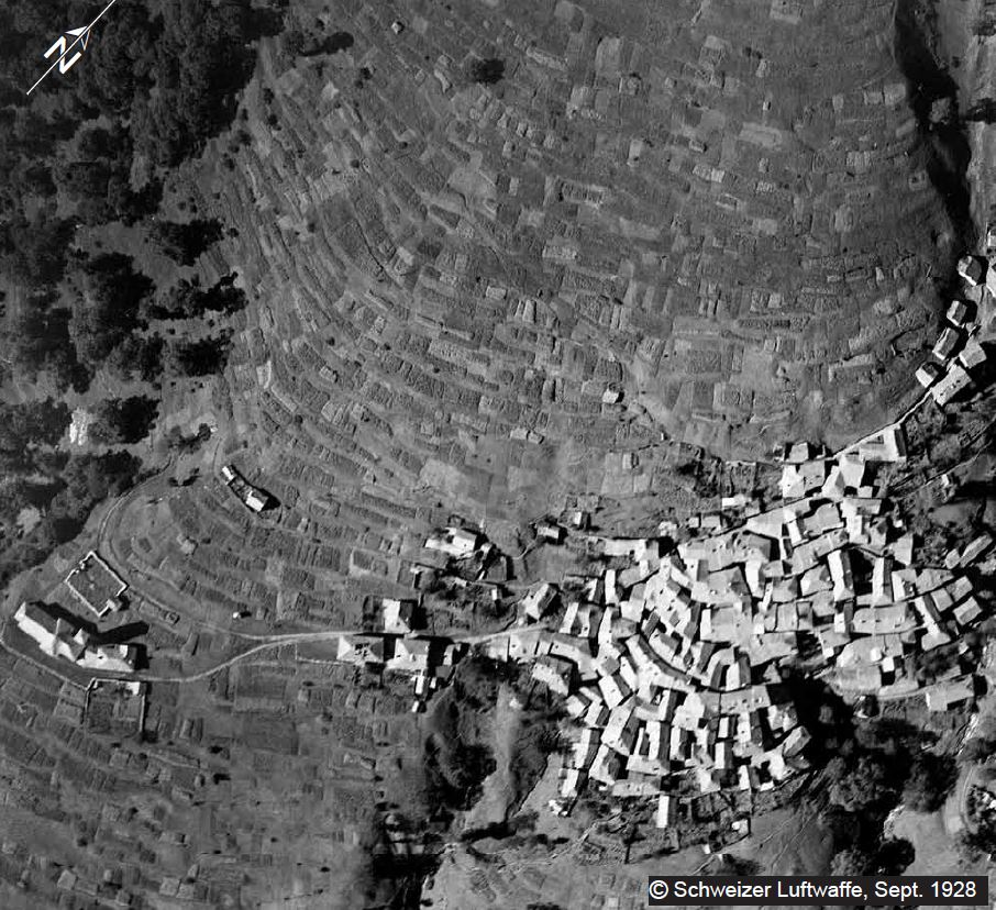 Indemini TI, Schweiz: 1928 Intensivnutzung